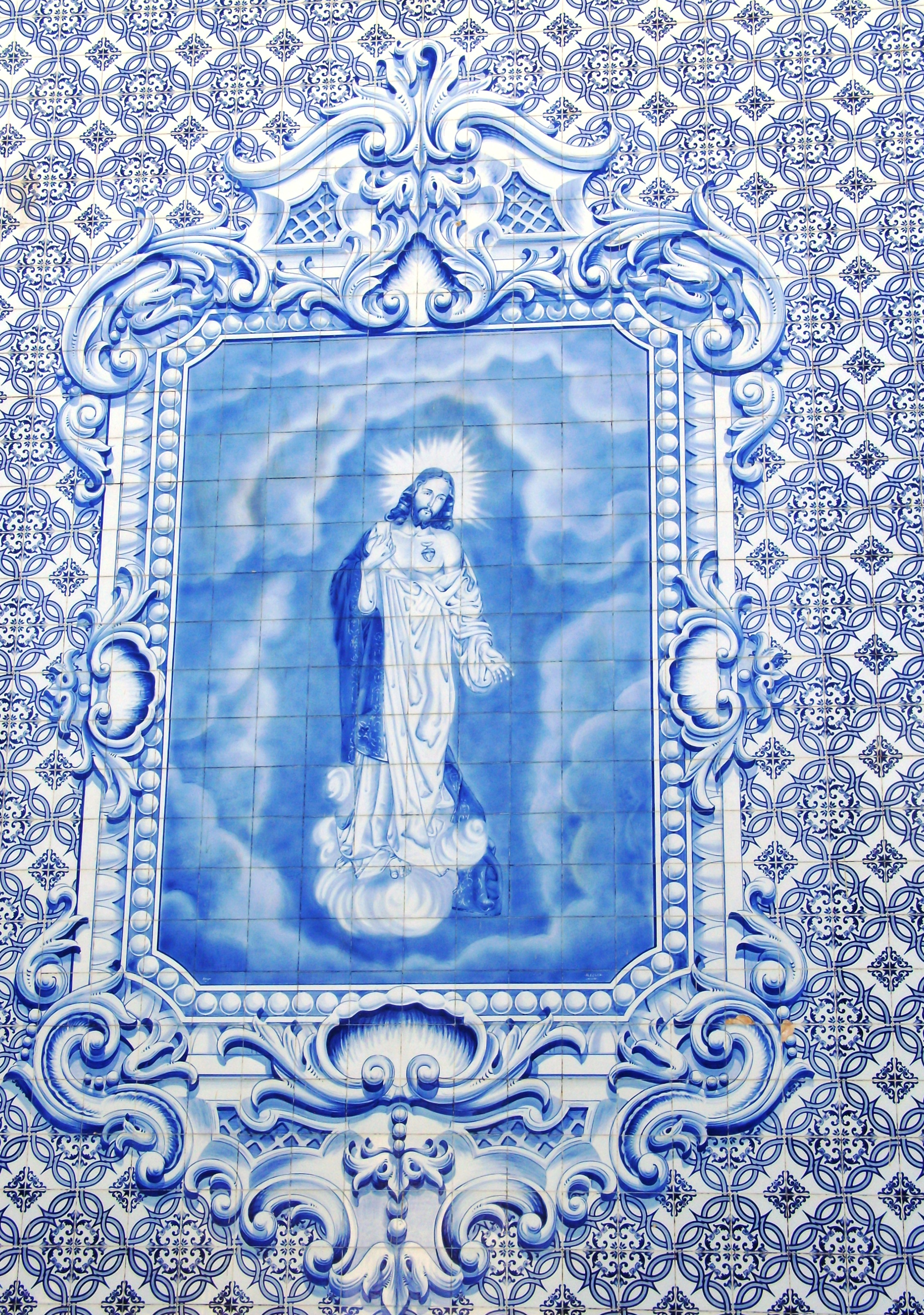 Igreja de Santa Marinha de Cortegaça, concelho de Ovar, distrito de Aveiro, Portugal: detalhe do painel de azulejos no alçado esquerdo, representando o Sagrado Coração de Jesus.